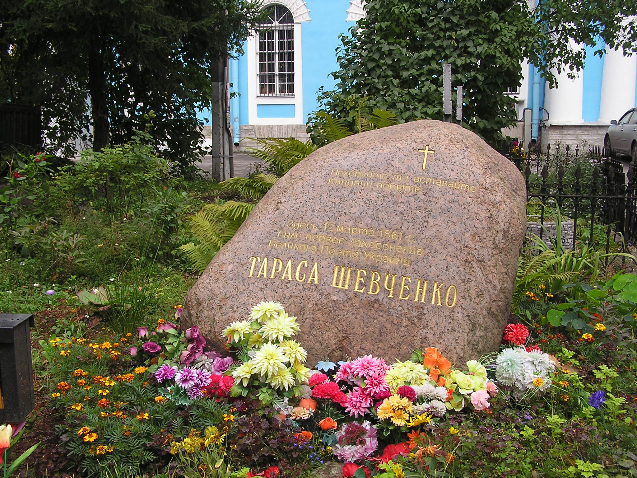 Санкт-Петербург. Смоленское кладбище. Первая могила Тараса Шевченко